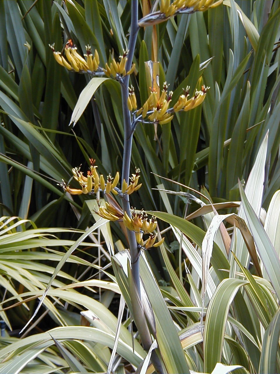 Phormium cookianum 'Tricolor' — Phormium—flax cultivar. Real Jardín Botánico de Madrid.